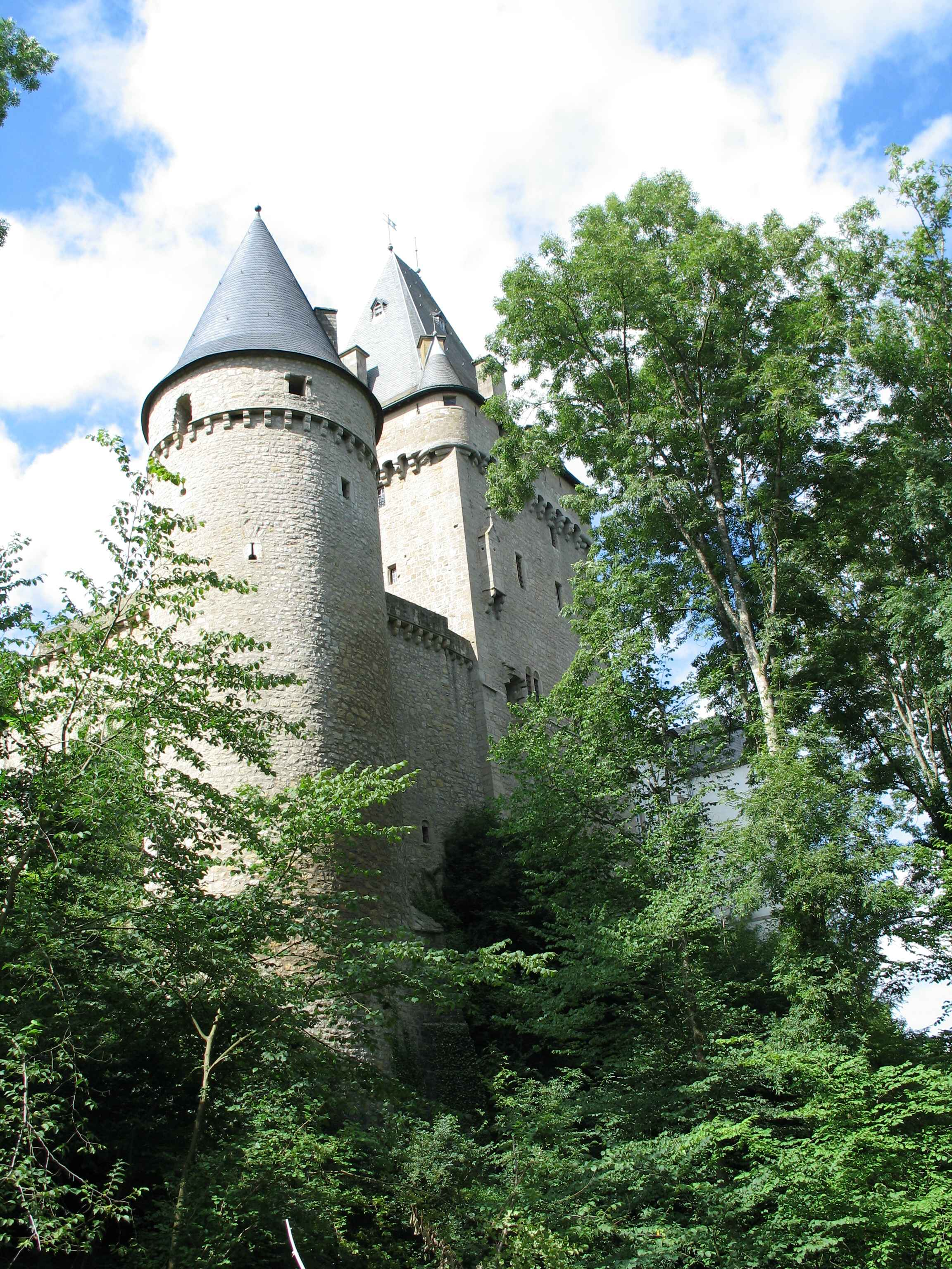 Le château de Hollenfels (Luxembourg)